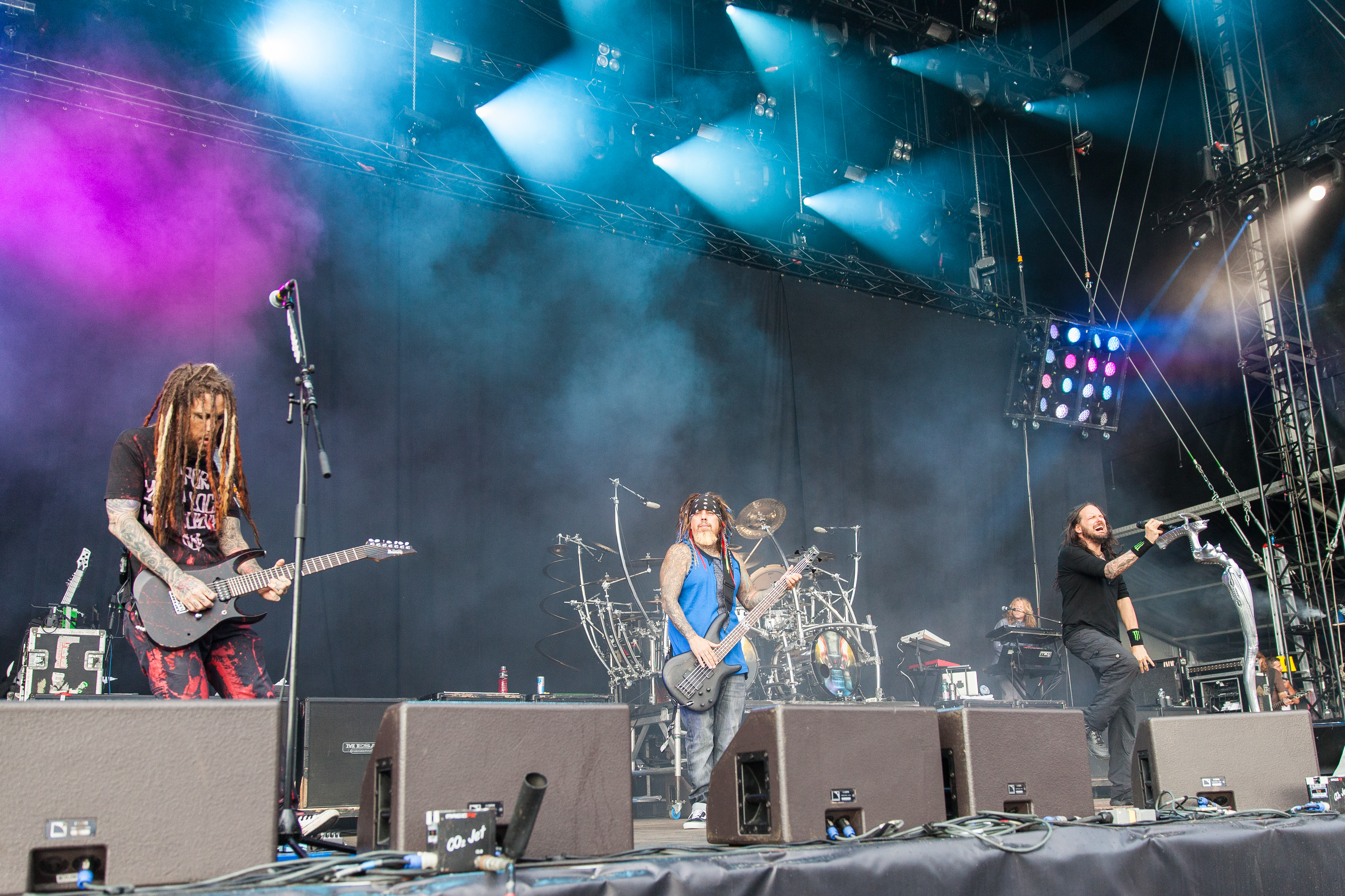 Rock'n'Heim Rock Festival Hockenheim August 2014